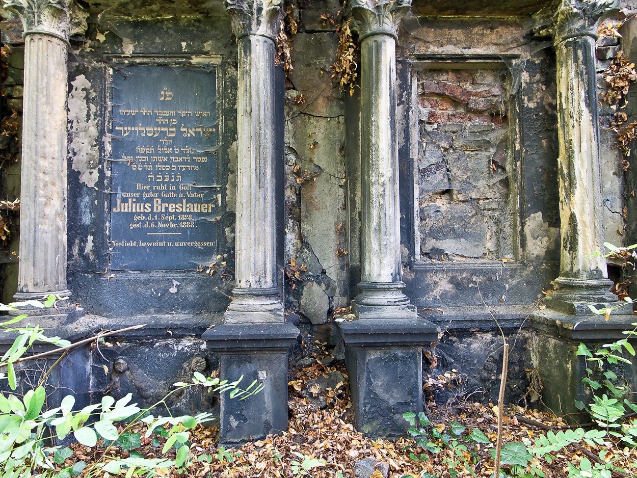 Cmentarz żydowski w Katowicach ul. Kozielska 16